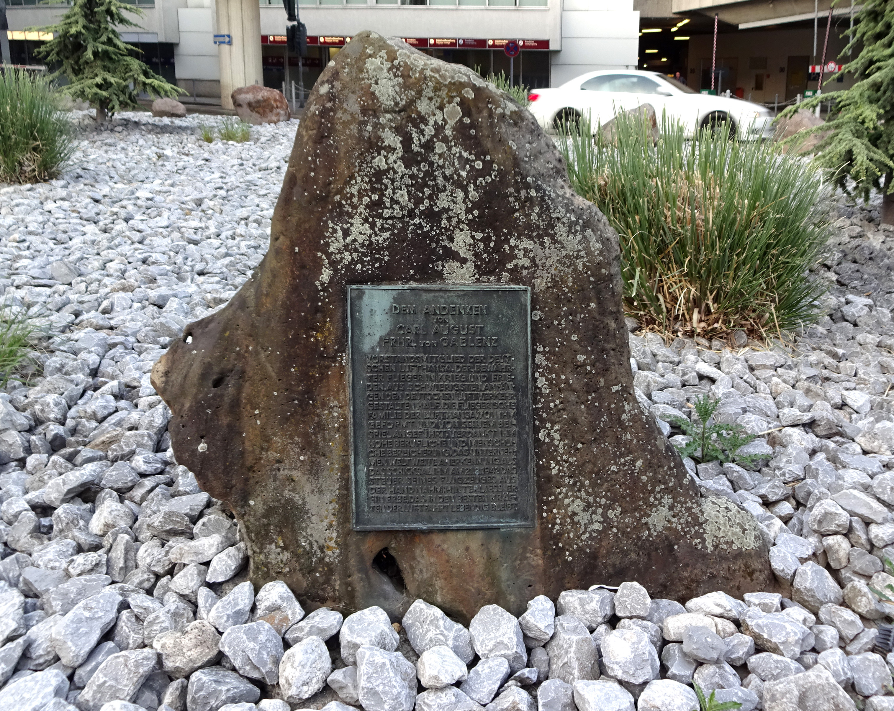 Gedenkstein für Carl August Freiherr von Gablenz, Vorstandsmitglied der Deutschen Lufthansa, Aussenbereich Ankunft Flughafen Düsseldorf